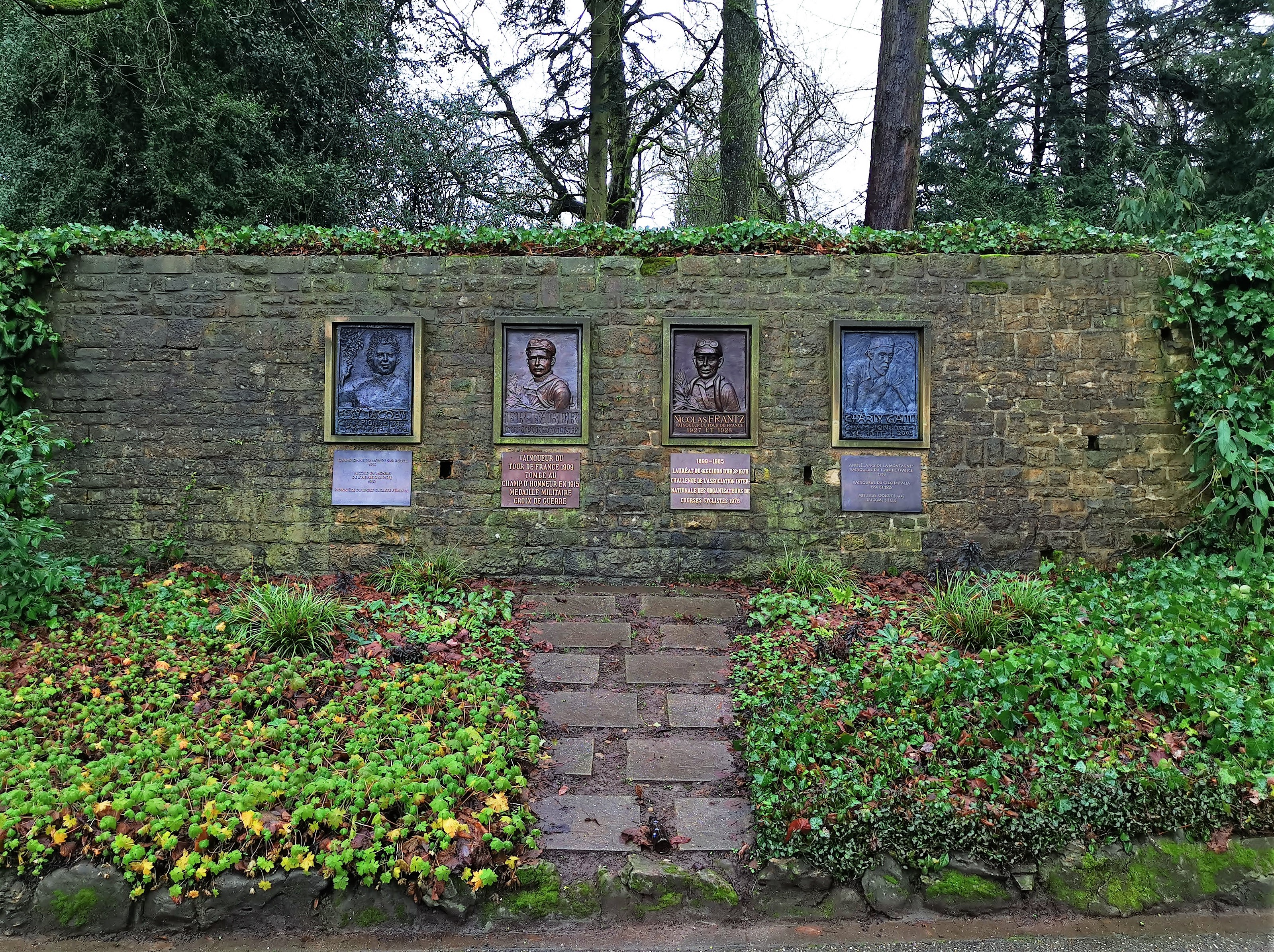 Luxembourg, plaques commémorant les cyclistes luxembourgeois François Faber, Nic. Frantz, Charly Gaul an Elsy Jacobs dans le Parc municipal de la ville de Luxembourg.